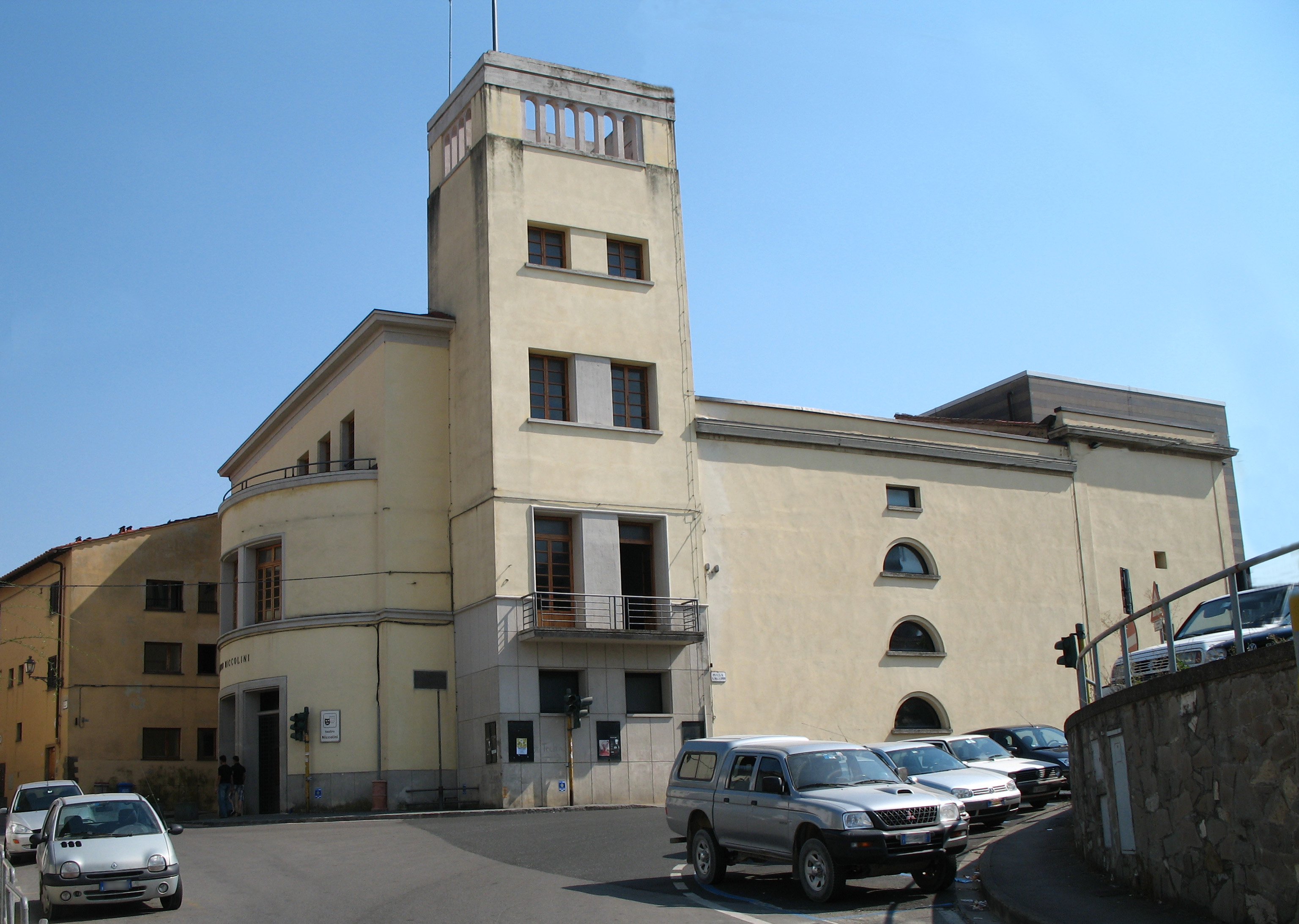 teatro Niccolini di San Casciano